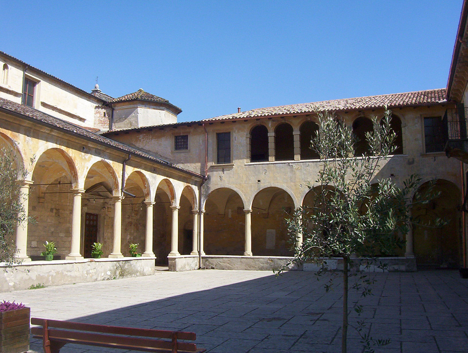 Chiostro della Piece di San Floriano. San Pietro in Cariano (VR). XII secolo